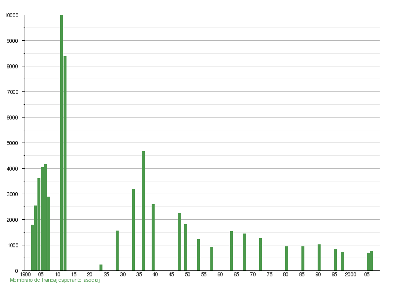 Grafiko prezentanta la membraron de francaj Esperanto-asocioj de 1902 ĝis 2006. (La dosiero estas kreita en la ŝablono Template:Ŝ per EasyTimeline kaj aperas en la paĝo :eo:Unuiĝo Franca por Esperanto#Membronombroj| .) Kategorio:Statistiko de Esperantujo